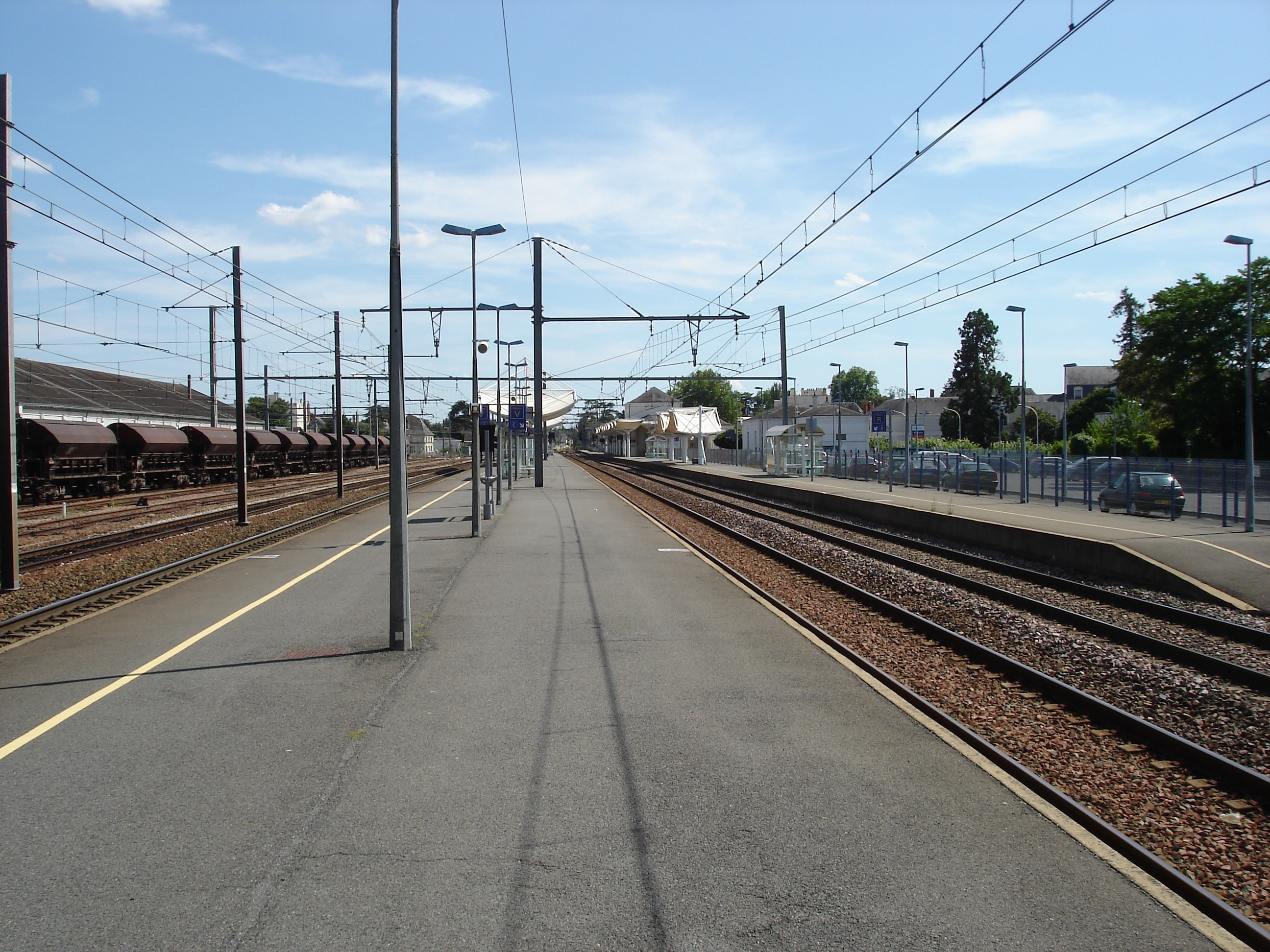 Gare de Châtellerault (86) : Vue en direction de Poitiers, des quais central et latéral.